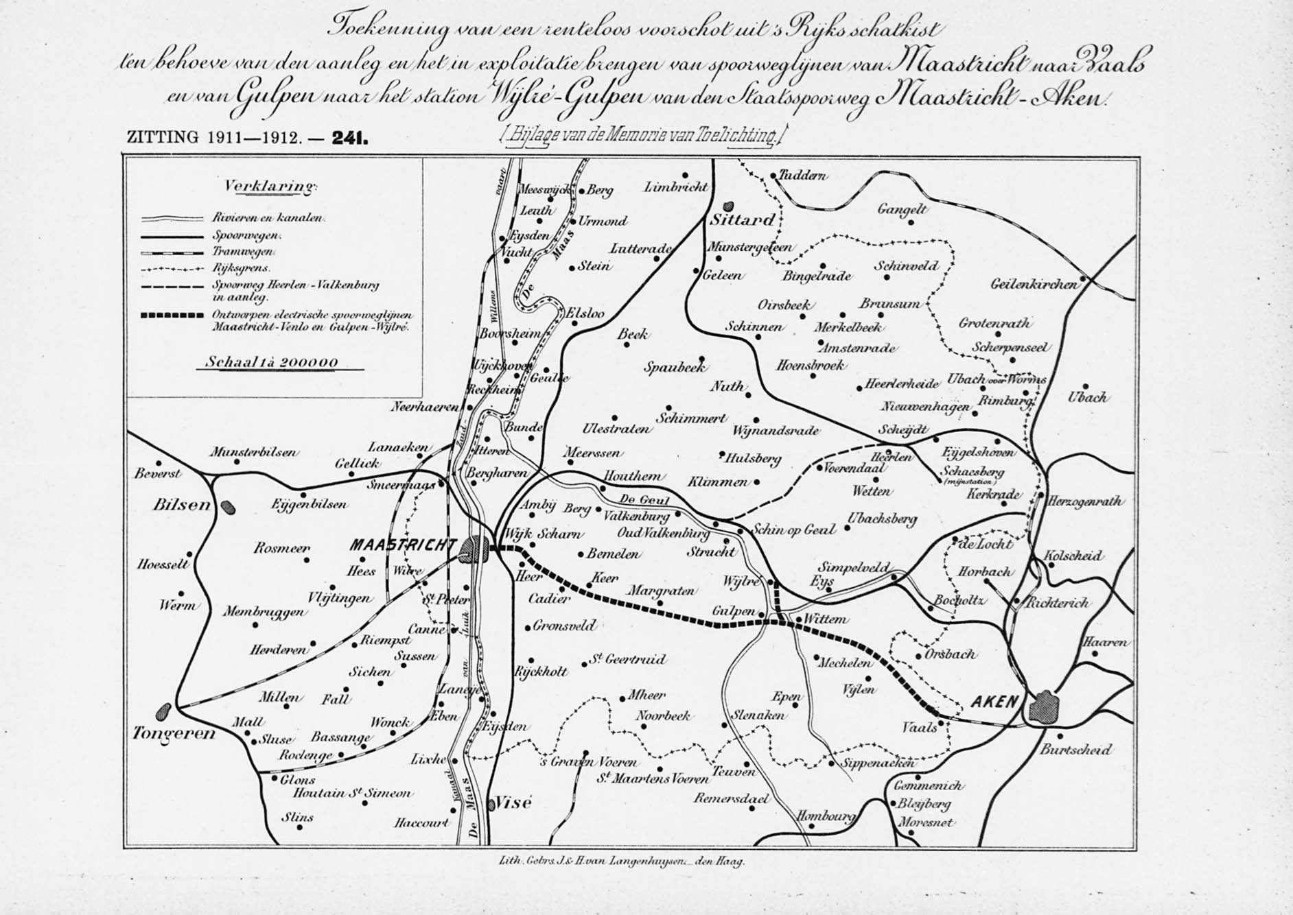 Op de kaart is tevens de in aanleg zijnde spoorweg van Heerlen naar Valkenburg ingetekend. In 1901 lag het plan voor een stoomtramweg van Maastricht naar Vaals gereed. Het benodigde aanlegkapitaal kon echter niet vergaard worden, zodat de zuidoosthoek van Limburg verstoken bleef van een spoorwegverbinding.